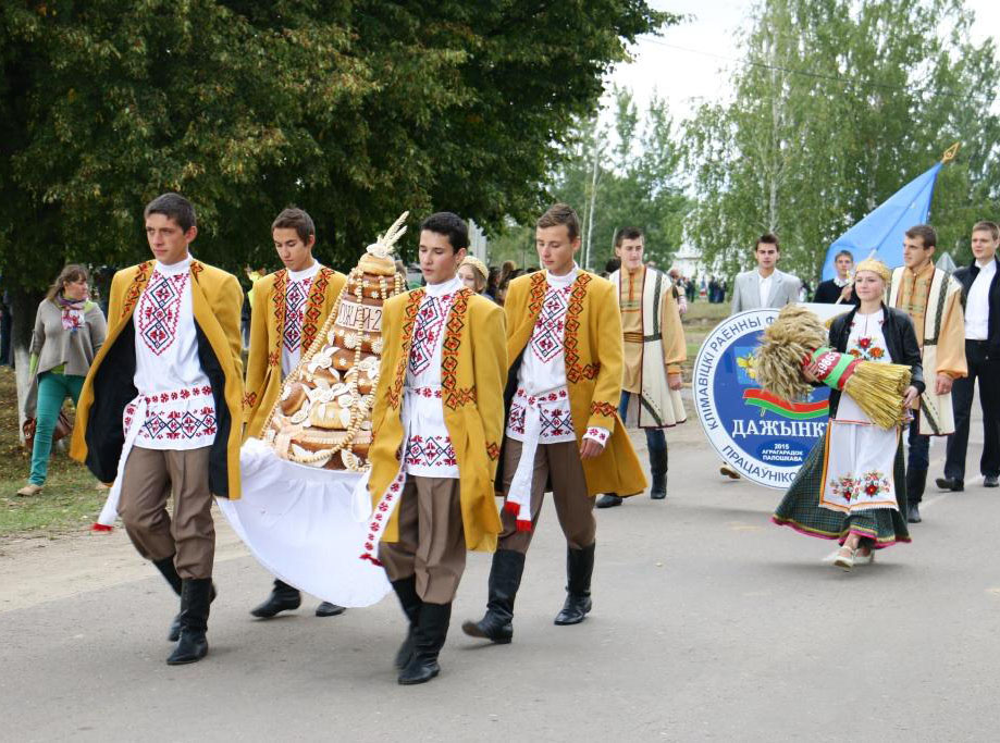 Dozhynki (Poloshkovo, Belarus), 2015